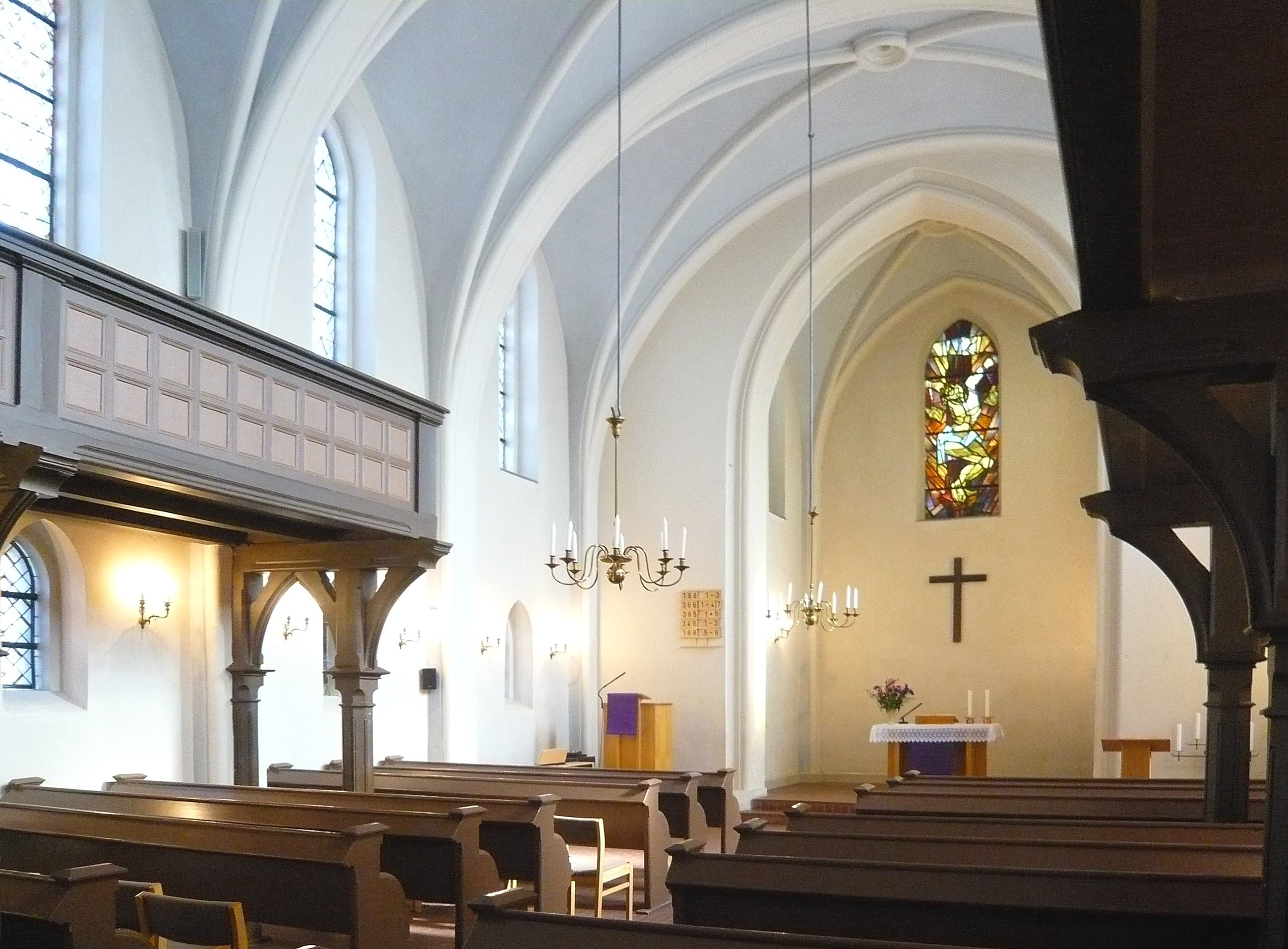 Ortsteil Marzahn, ev. Dorfkirche